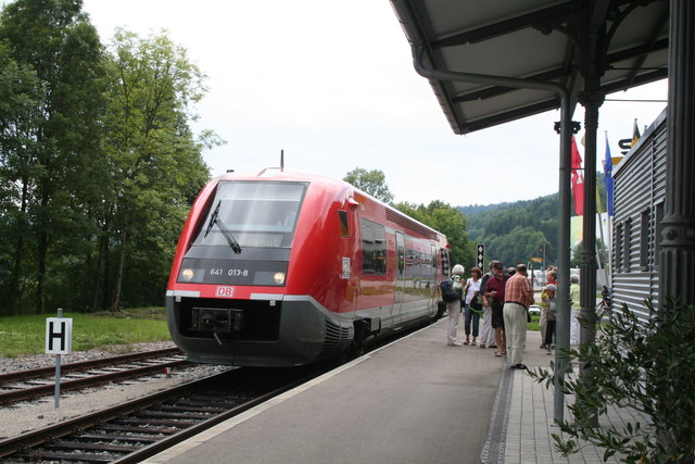 Triebwagen der Baureihe 641 im Bahnhof Weizen.